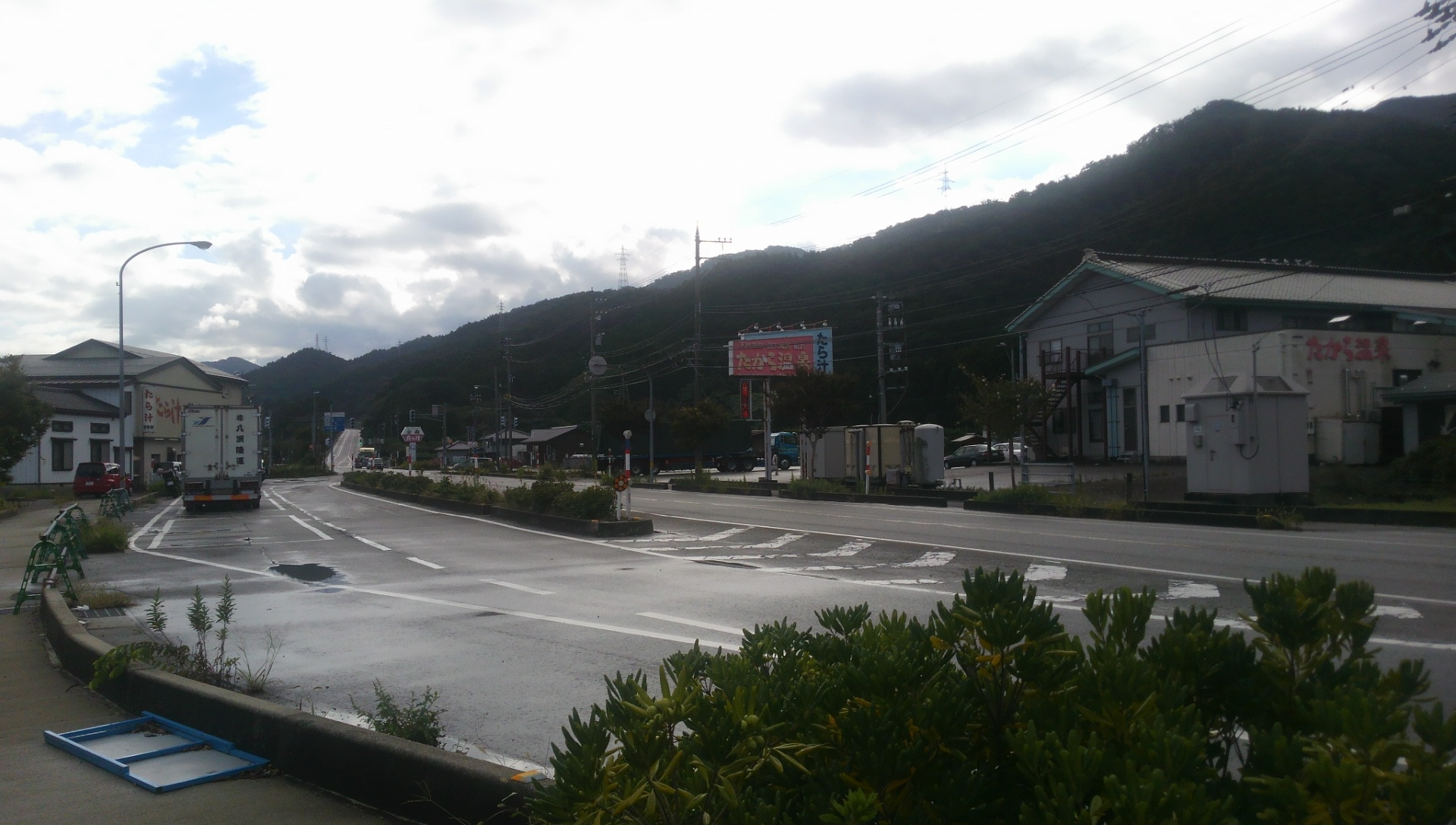 たら汁街道（富山県朝日町境、国道8号）